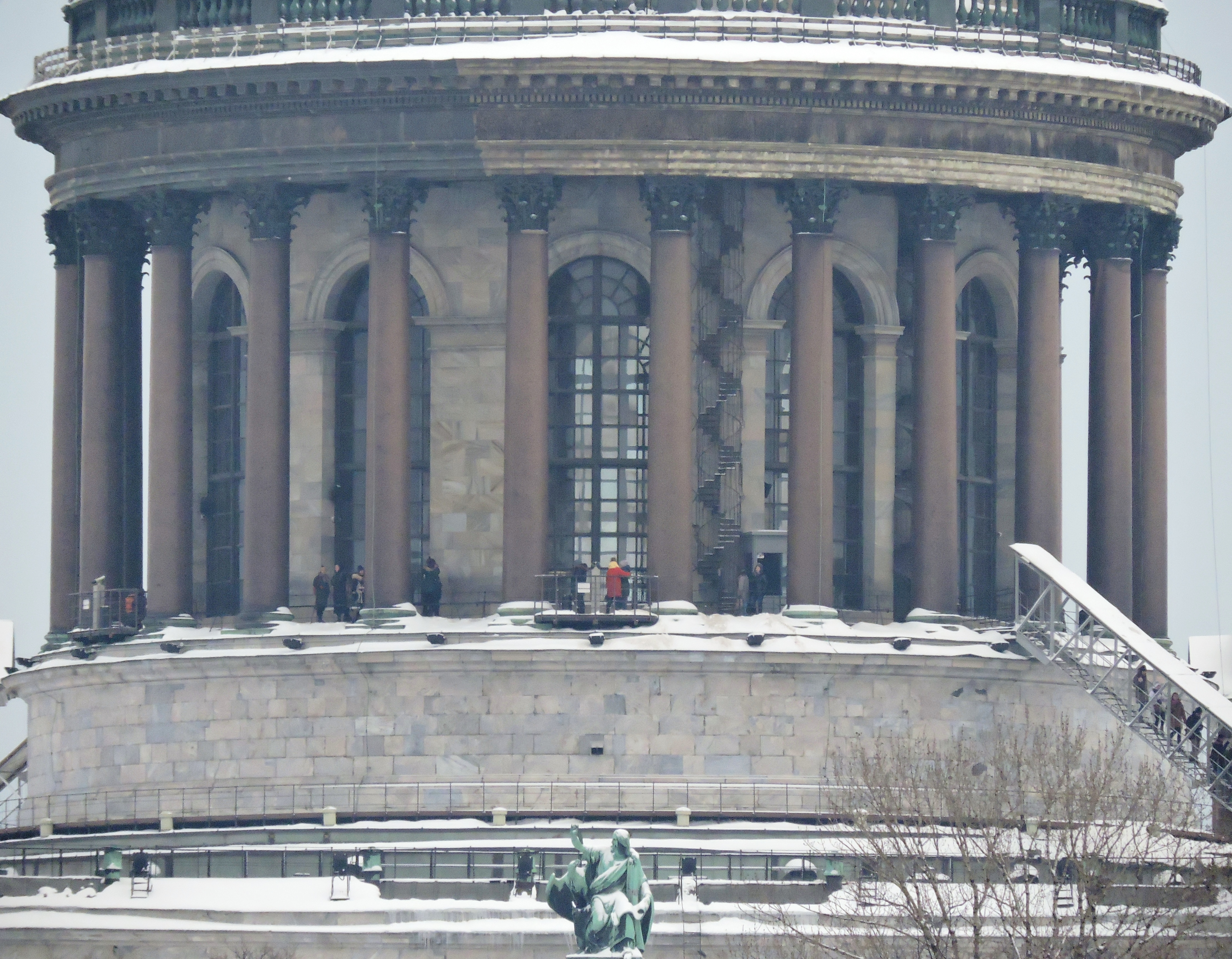 Колоннада Исаакиевского собора